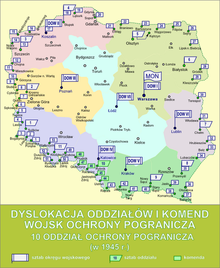 Dyslokacja oddziałów i komend Wojsk Ochrony Pogranicza - 10 Oddział Ochrony Pogranicza w 1945 r.